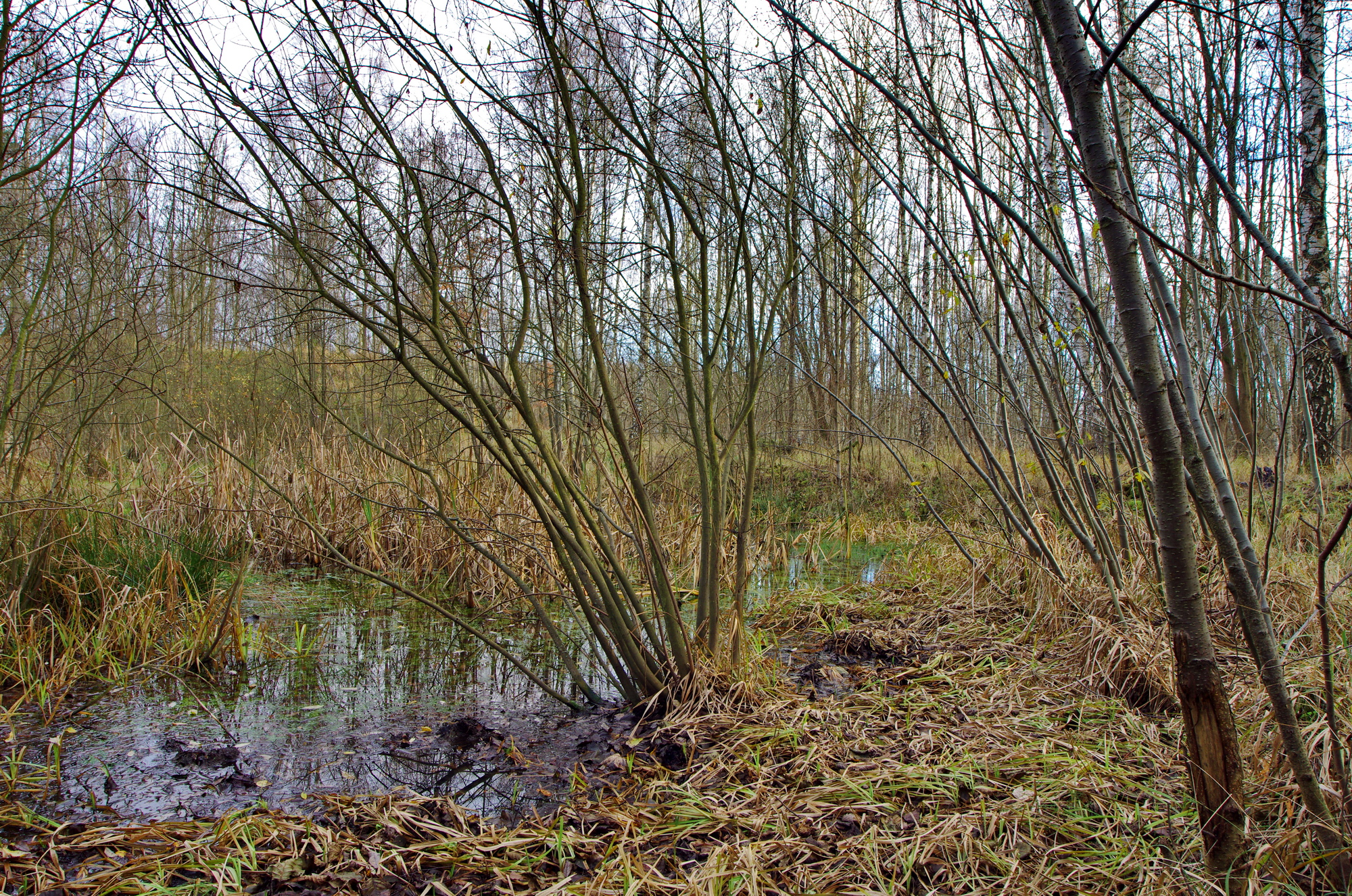 Evropsky významná lokalita Matyáš, Lomnice, okres Sokolov